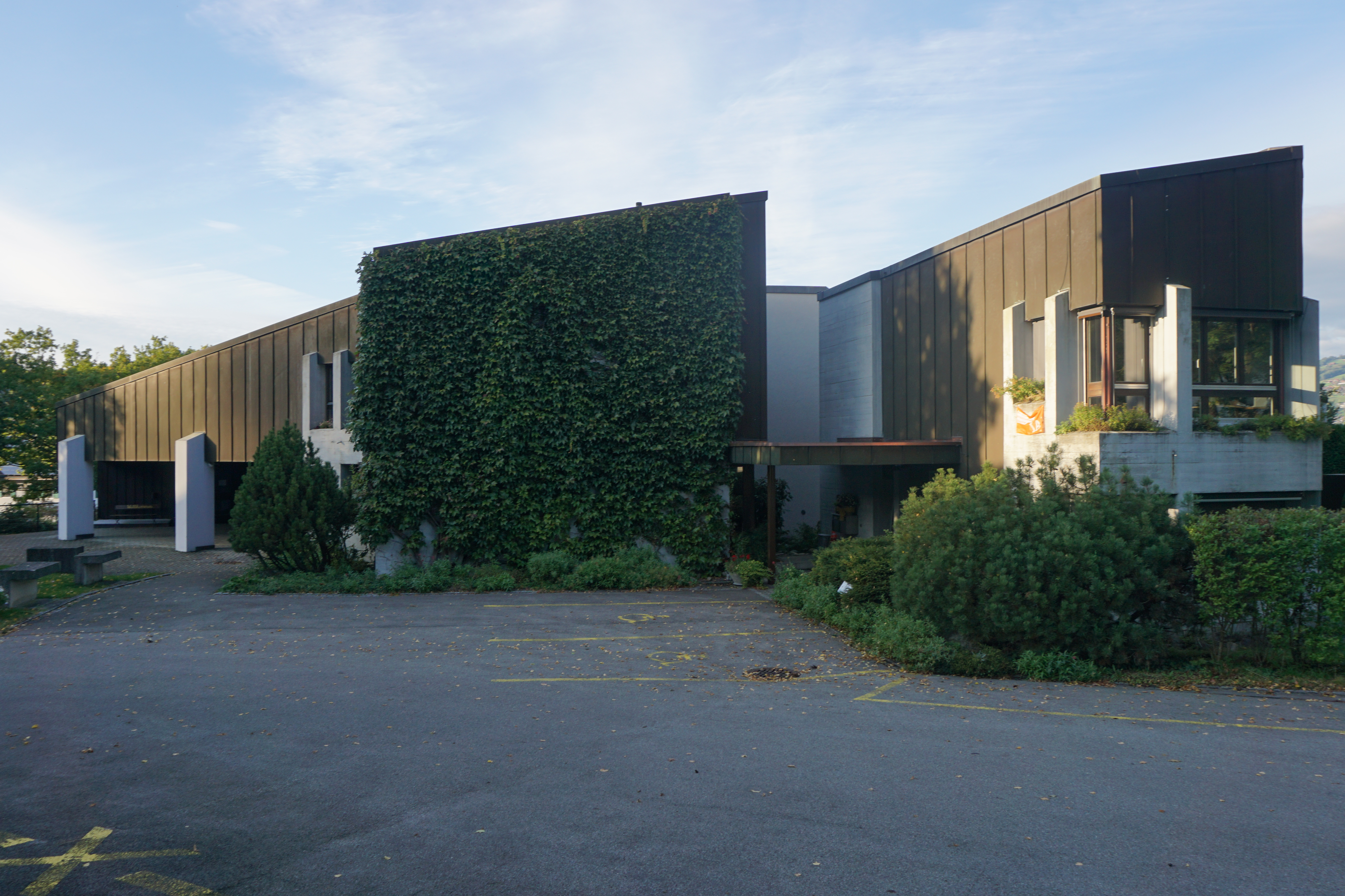 Bruder Klaus Kirche Spiez, Ostseite mit Pfarrhaus